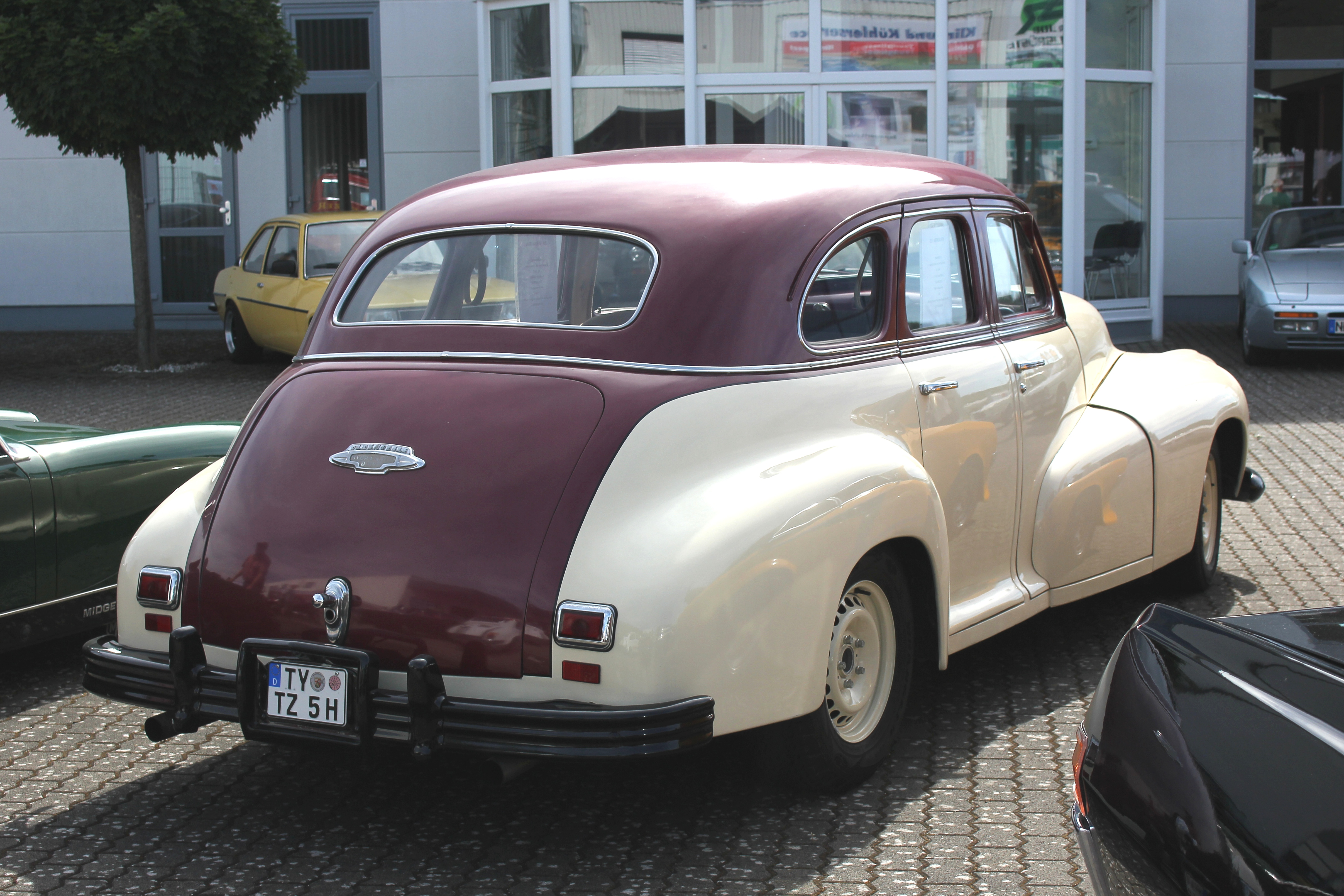 Oldsmobile Special Sixty V8, Baujahr 1947 (Kennzeichen verändert)